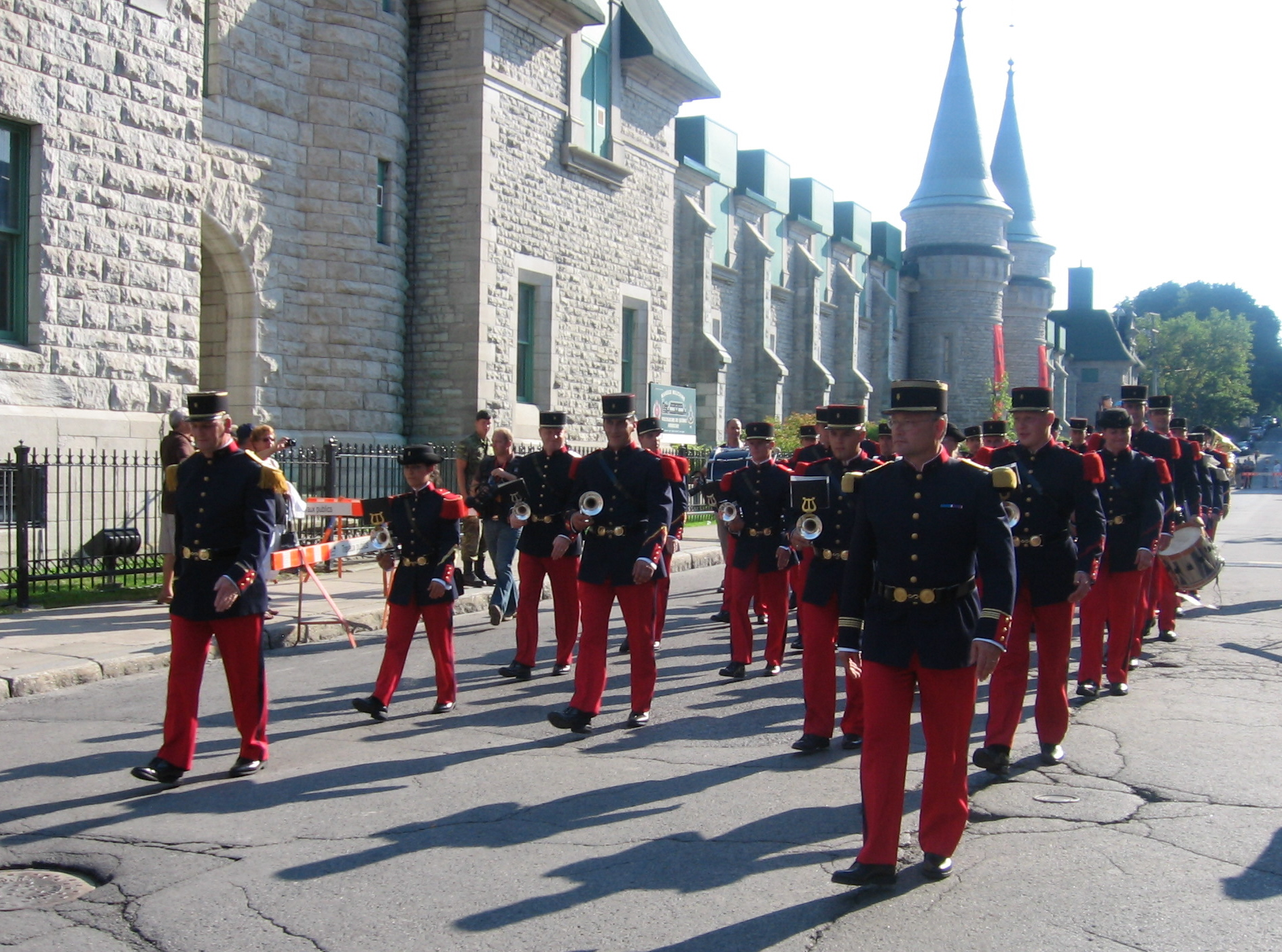 Régiment de Lille à Québec